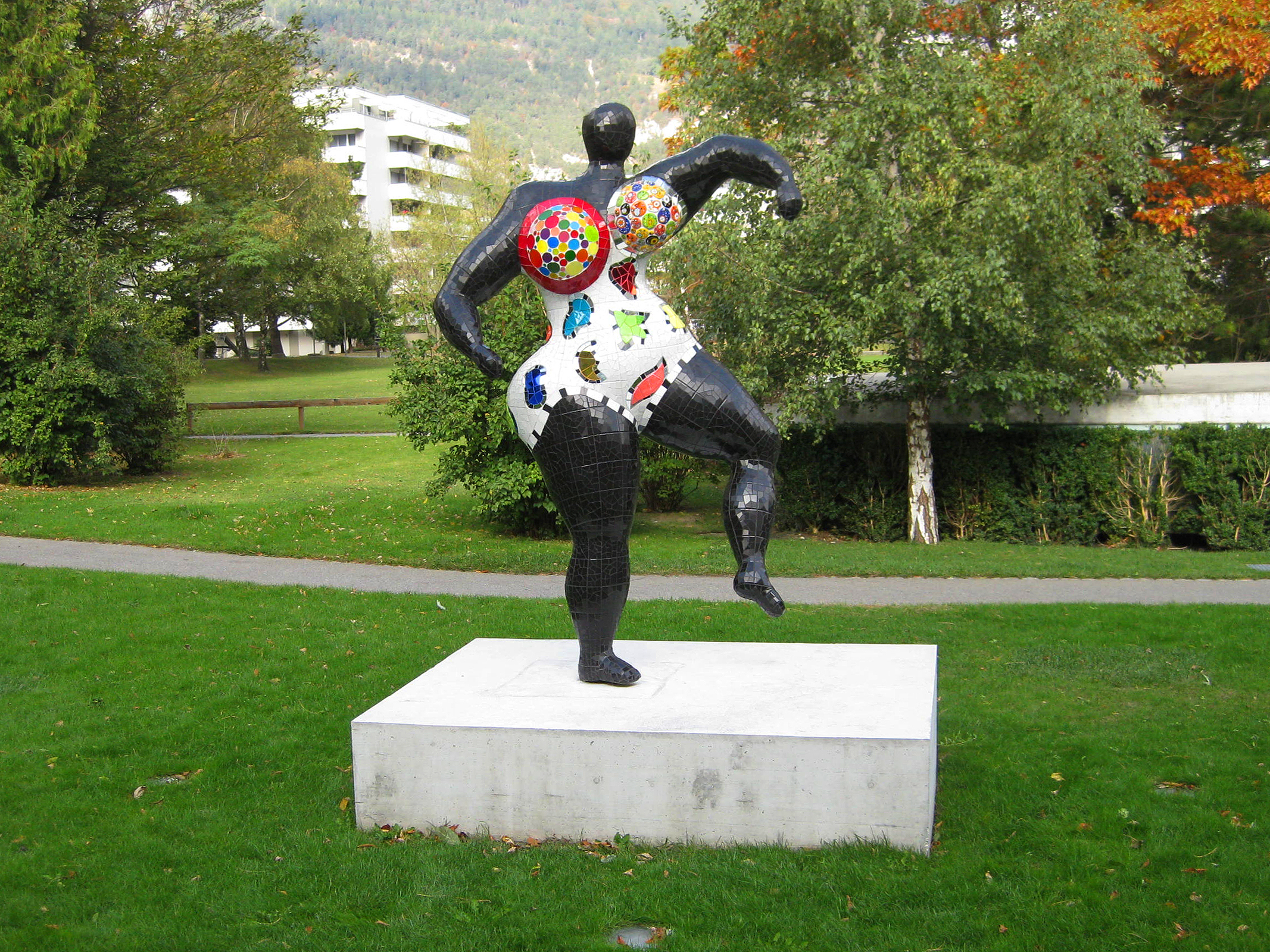 Niki de Saint Phalle, Nana Mosaïque Noire, 1999, - Schweiz, Graubünden, Chur, (Sammlung Würth)